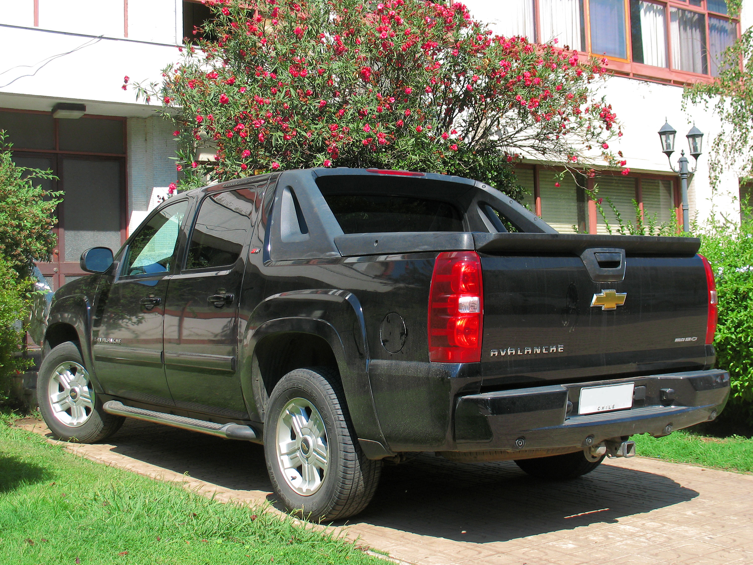 Chevrolet Avalanche Z71 2009